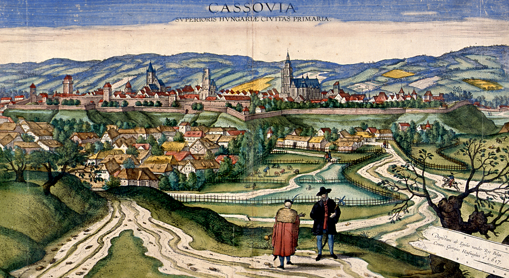 Košice - Prvé mesto Horného Uhorska 1617.